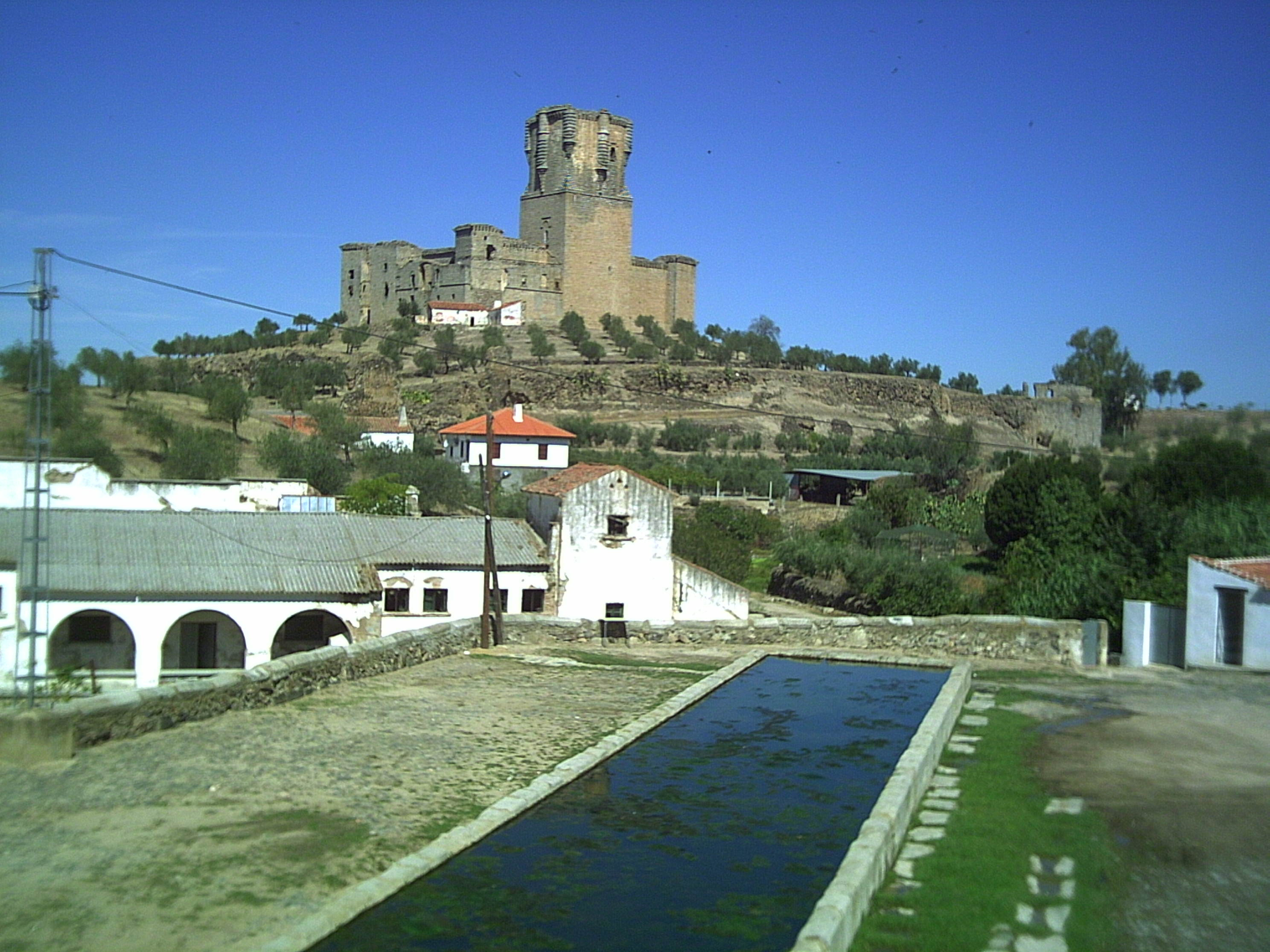 Vista del Castillo de los Sotomayor y Zúñiga (Belalcázar) desde el estanque de El Pilar.